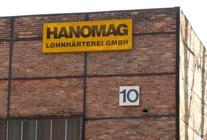 Schild auf Hanomag Gelände, Halle 2010 abgerissen